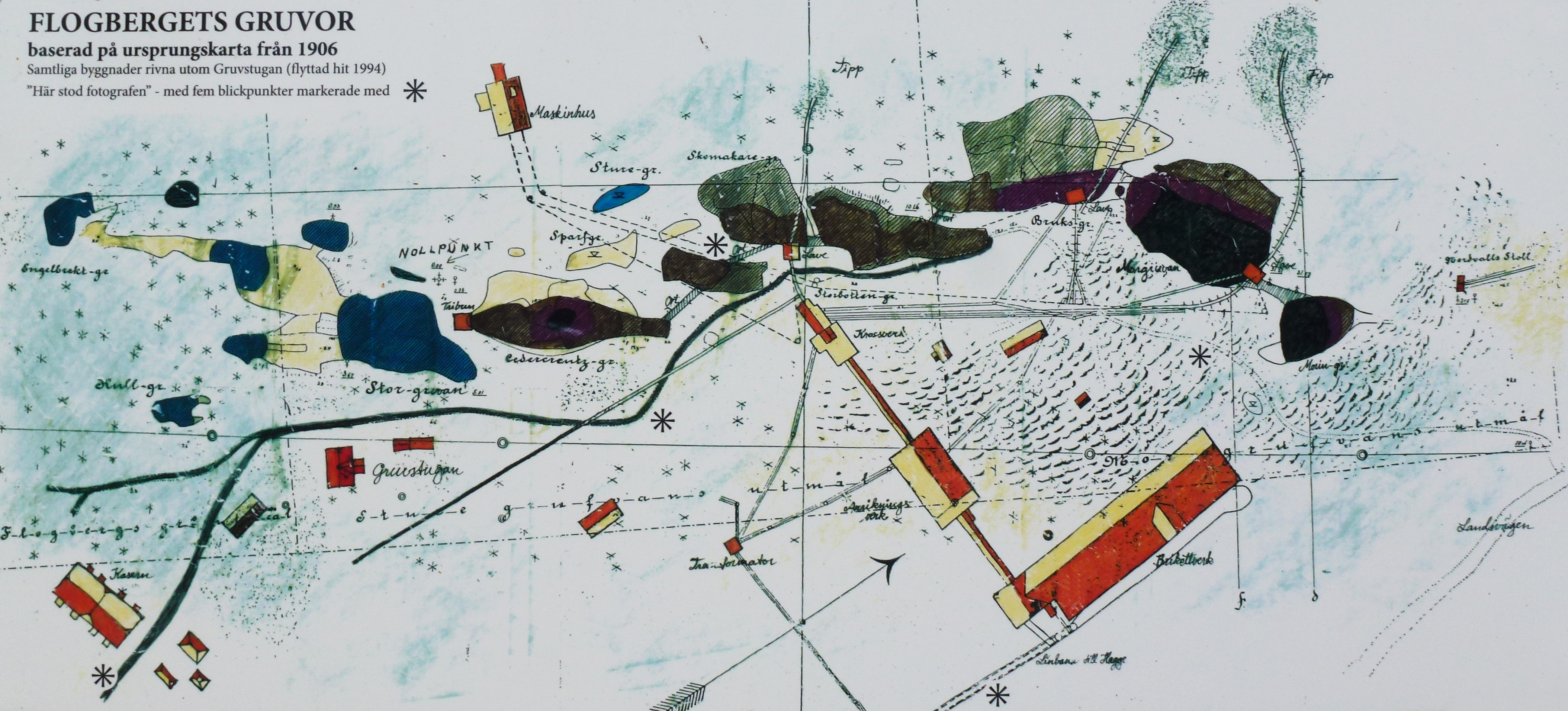 Karta över Flogbergets gruvor och byggnader